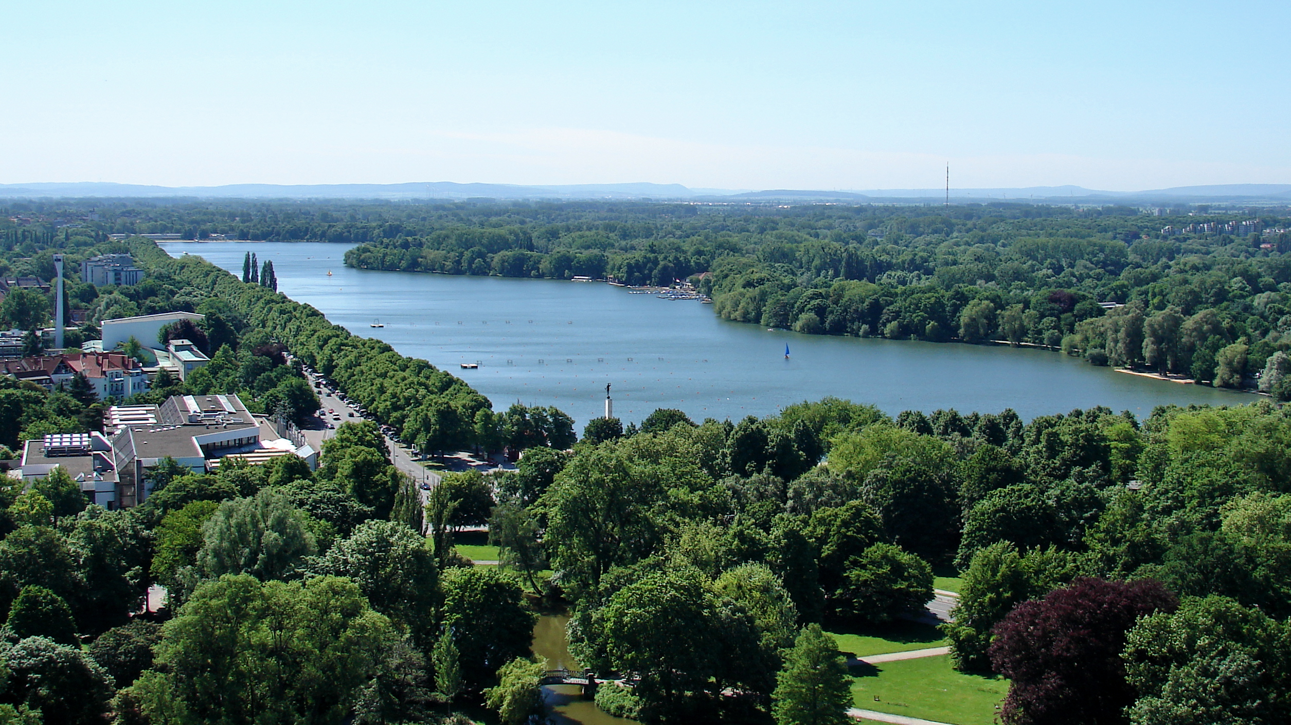 Maschsee vom neuen Rathaus in Hannover.